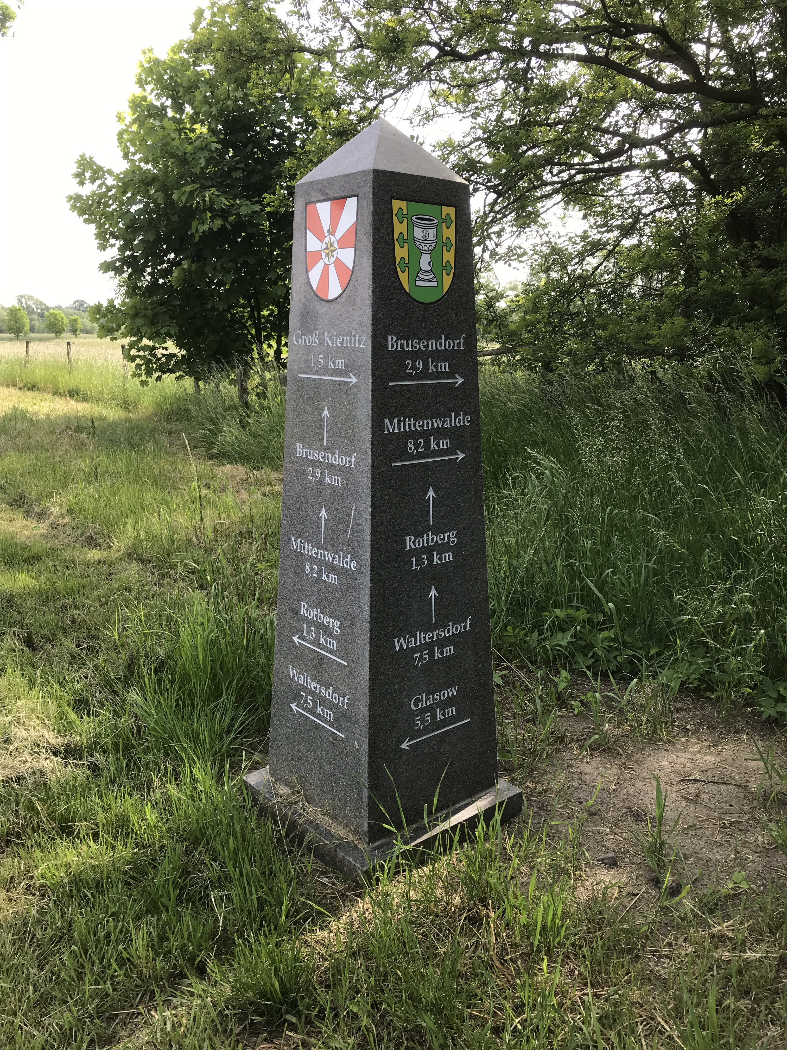 Tollkrug, ein Wohnplatz in Schönefeld-Waltersdorf in Brandenburg